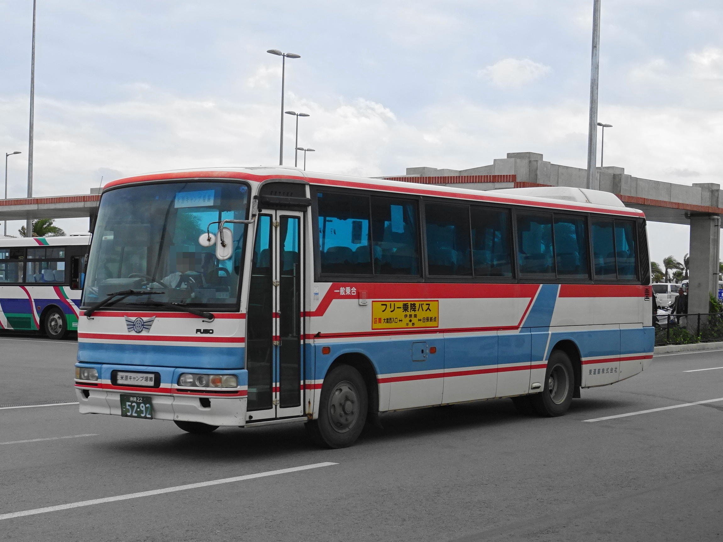 Ishigaki→Omoto→Kabira→Ishigaki Airport